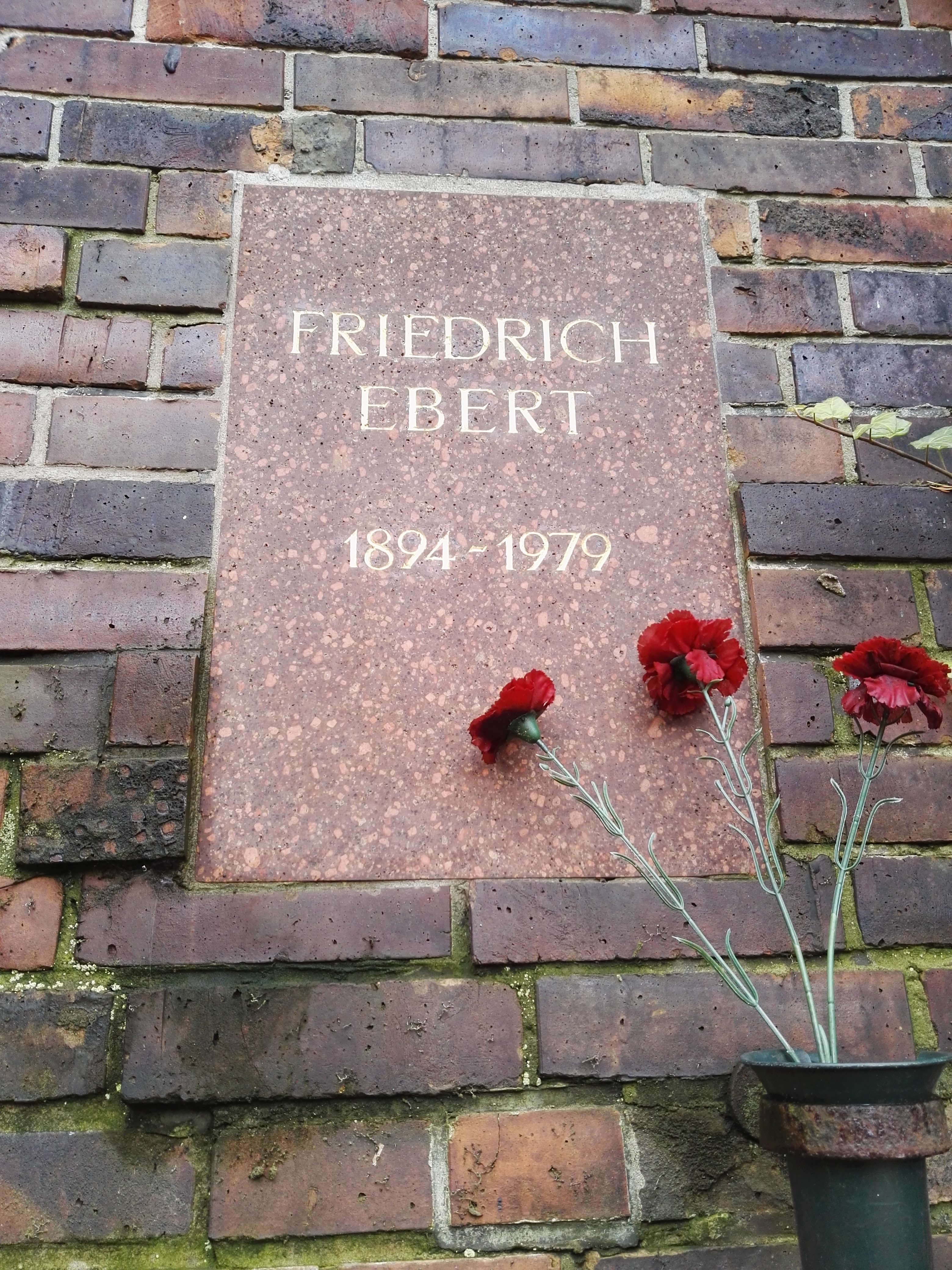 Grab von Friedrich Ebert junior in der Gedenkstätte der Sozialisten auf dem Zentralfriedhof Friedrichsfelde in Berlin-Lichtenberg